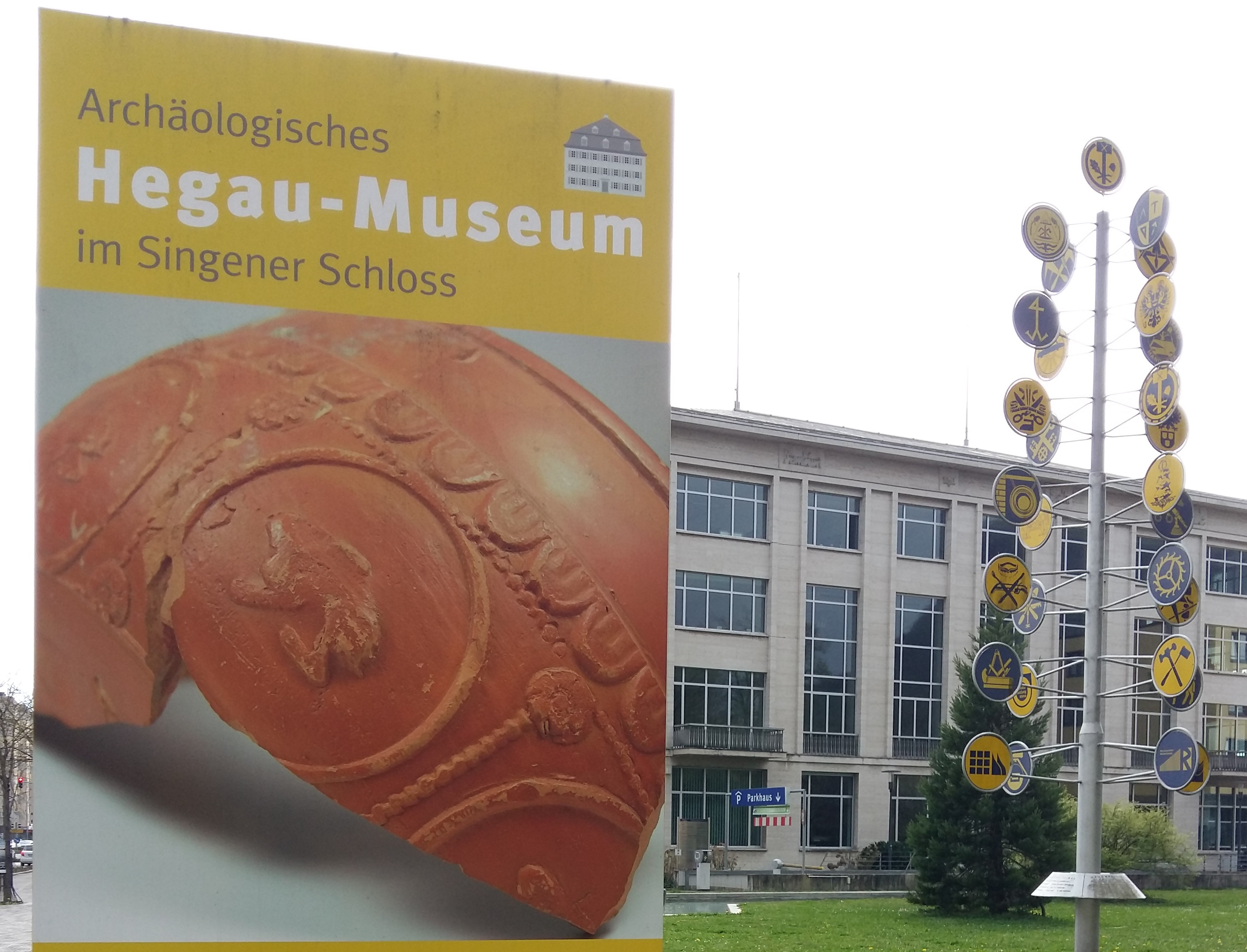 Orsinger Terra Sigillata